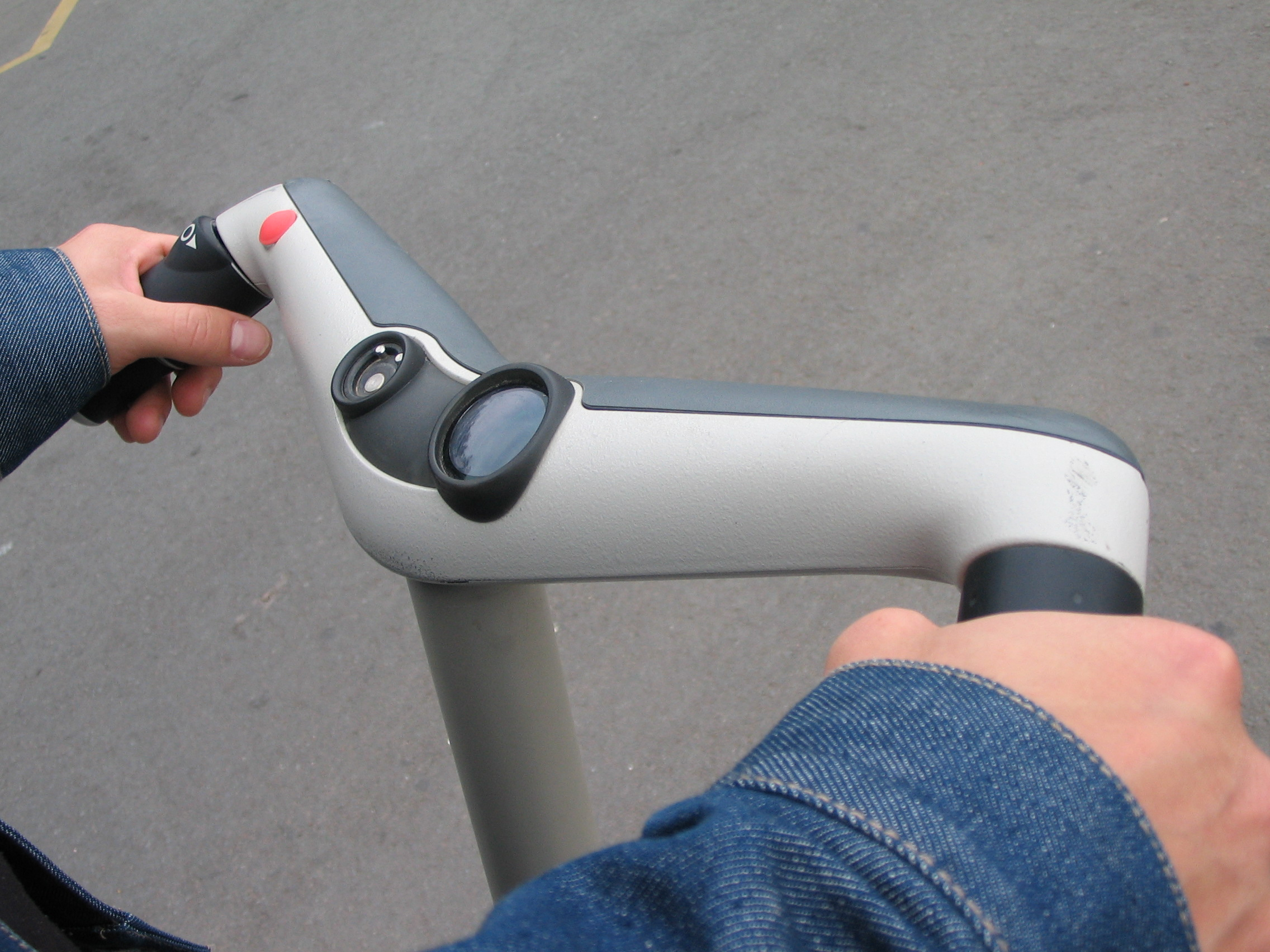 Instrumentation rudimentaire.